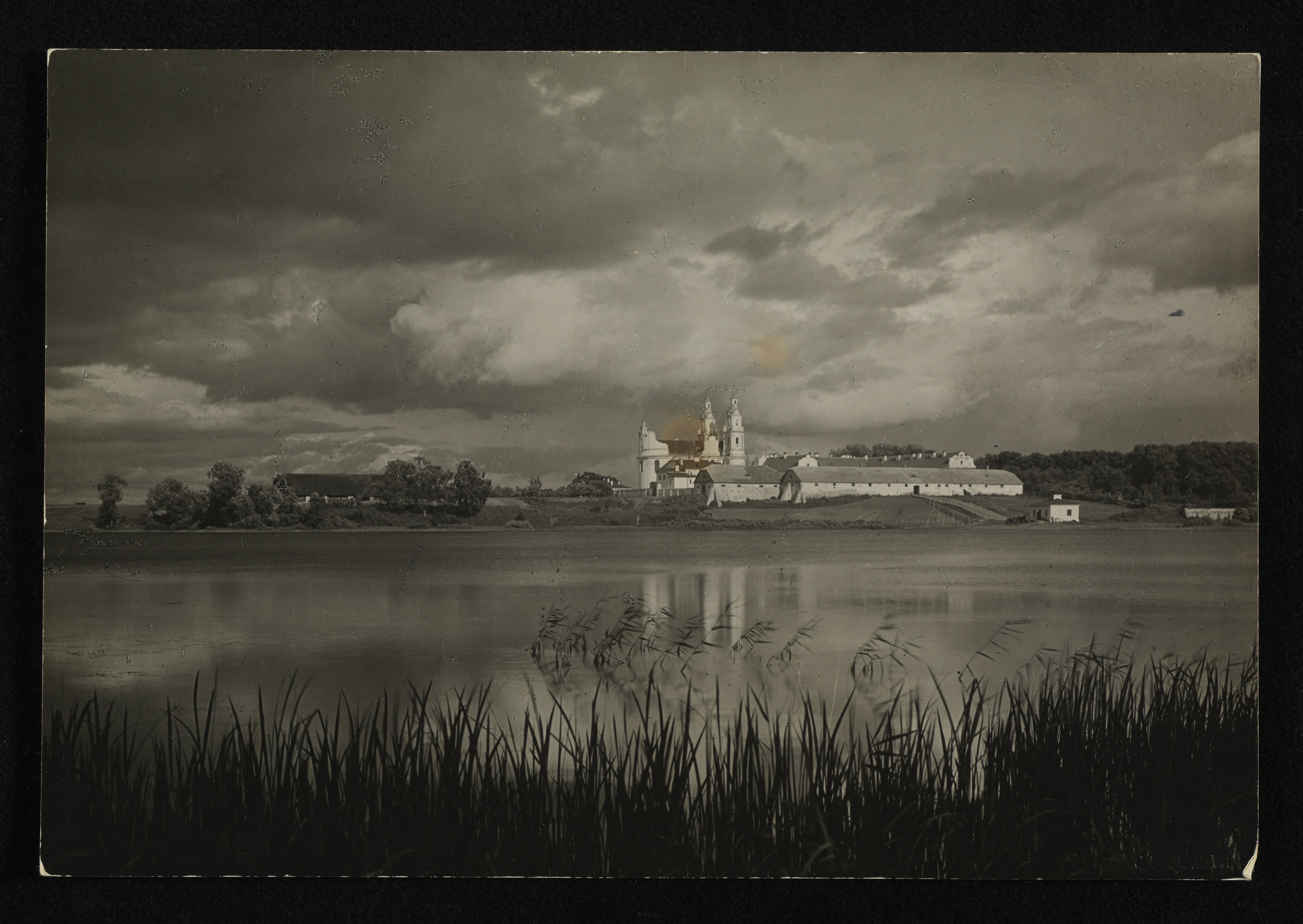 Беларуская (тарашкевіца): Глыбокае (Hłybokaje), возера Падлазнае (Padłaznaje) і прадмесьце Беразьвечча (Bieraźviečča). Царква Сьвятых Апосталаў Пятра і Паўла і манастыр базылянаў